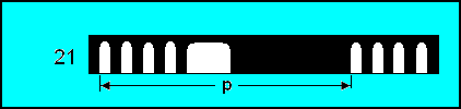 Característica luminosa de faros, balizas y boyas. Destellos segun código morse en números Ej:(Número 4 = punto punto punto punto raya)